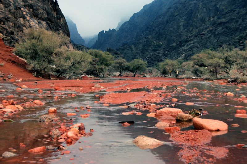 شعيب جو بجبال أجـــا